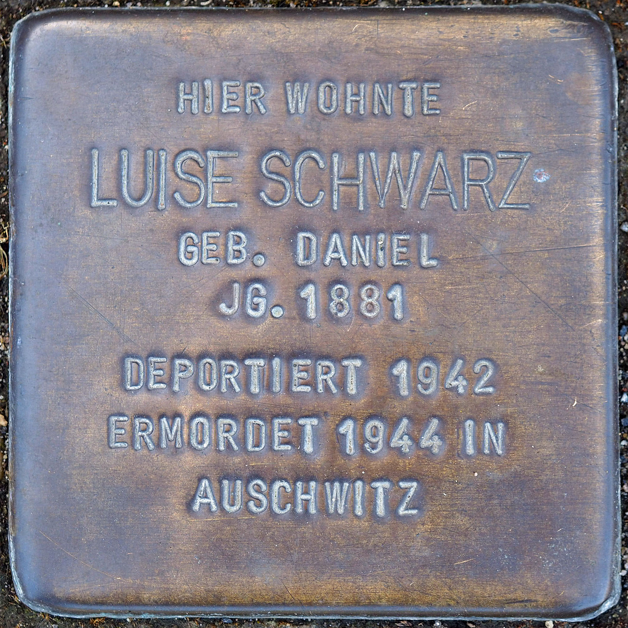 Stolpersteine Korschenbroich: Schwarz, Luise